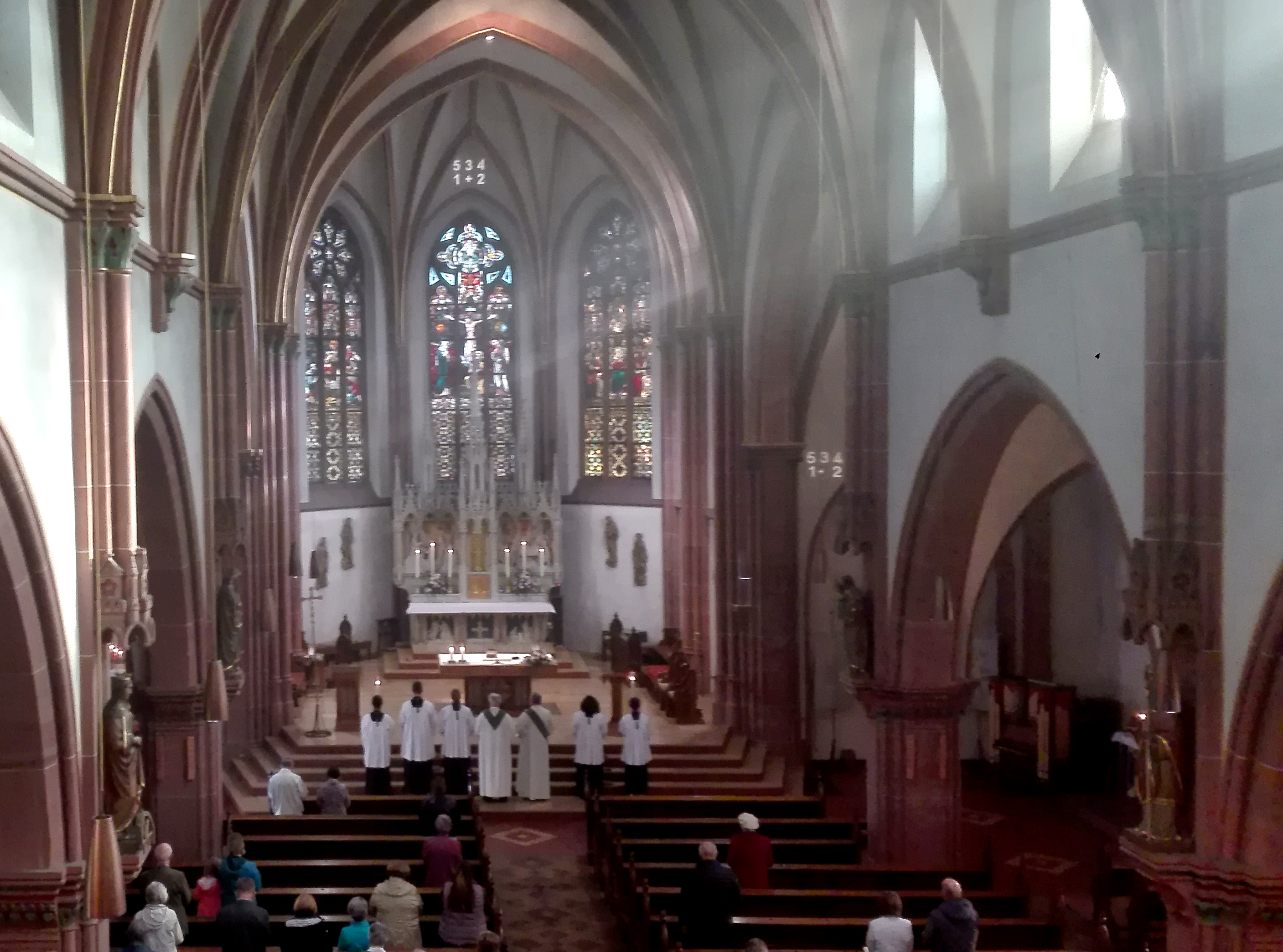 Blick von der Orgelempore durchs Kirchenschiff in den Chorraum der neugotischen Pfarrkirche St. Pankratius (Offenbach-Bürgel)